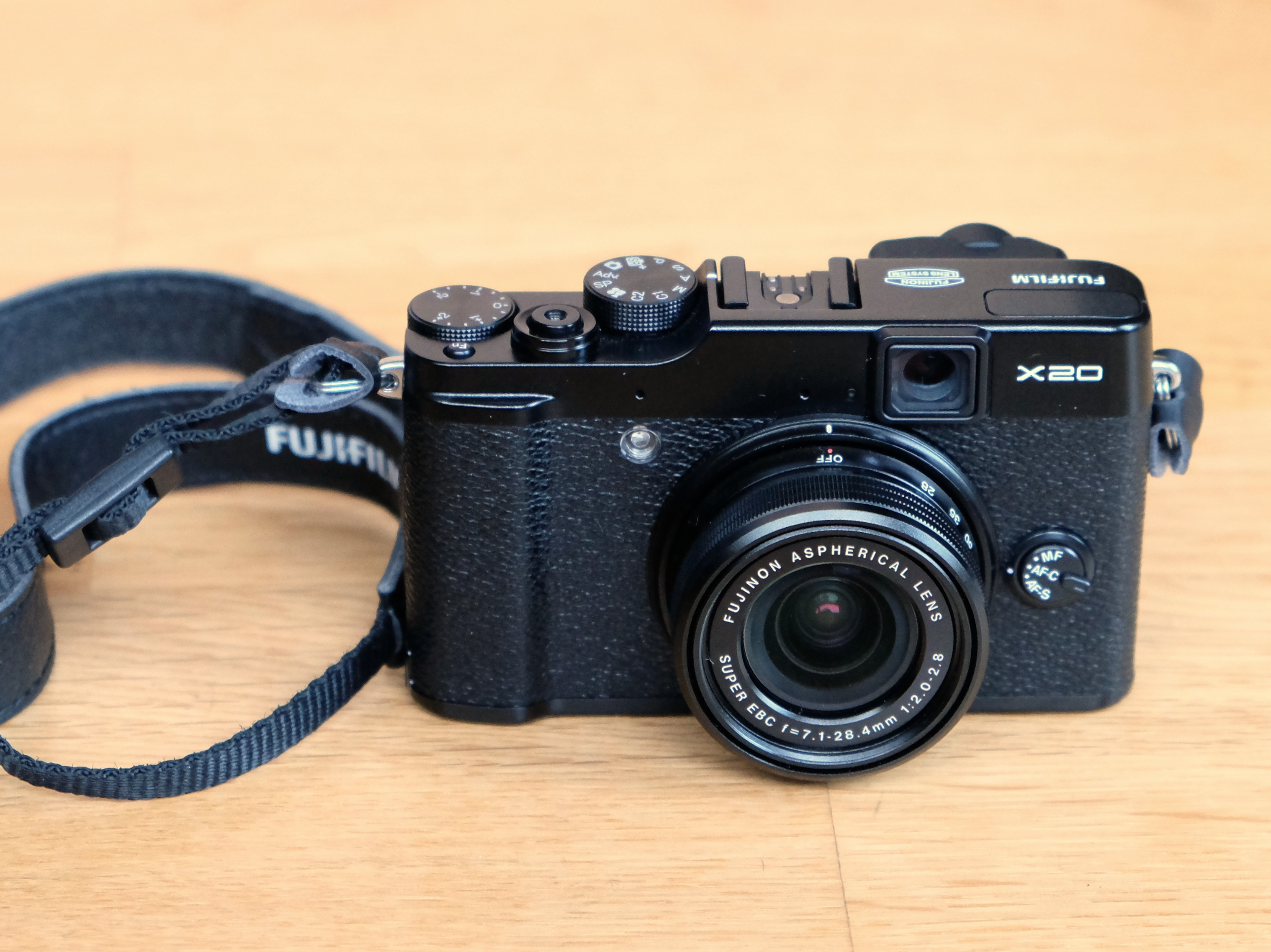 Digitalkamera Fujifilm X20